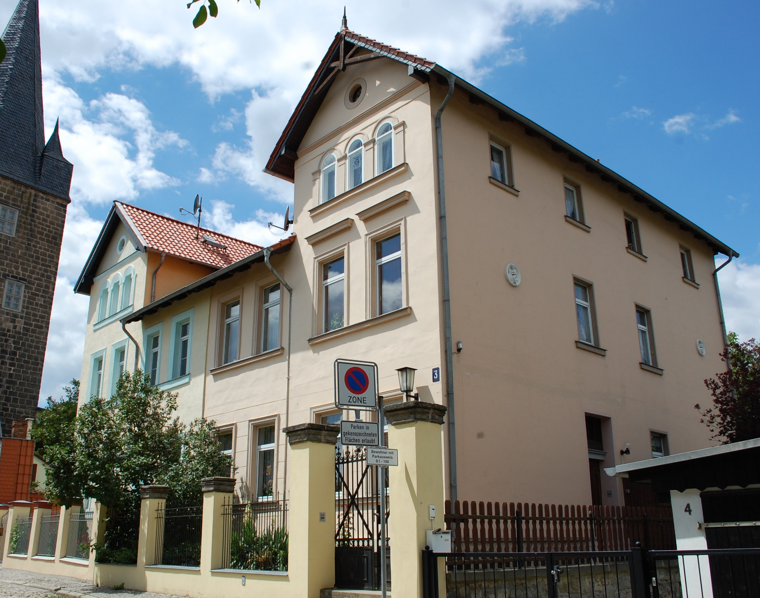 Haus Heidfelstraße 2, 3 in Quedlinburg